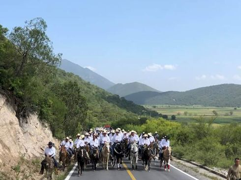 Cabalgata ( organizada por alcaldía ) - Iturbide, Nuevo León, México